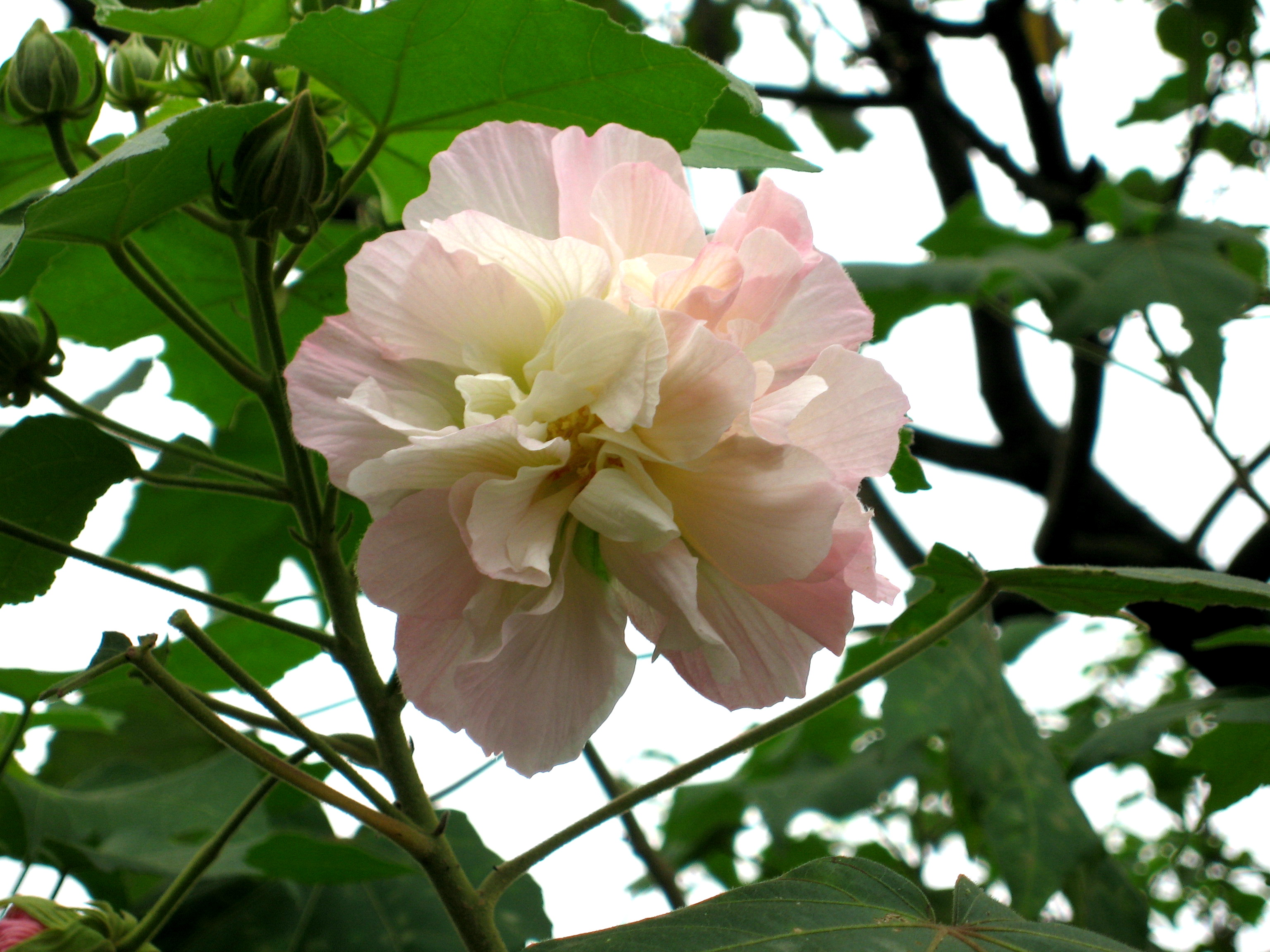 木芙蓉，本本一世2005年10月摄于zh:成都zh:温江区花卉博览园。